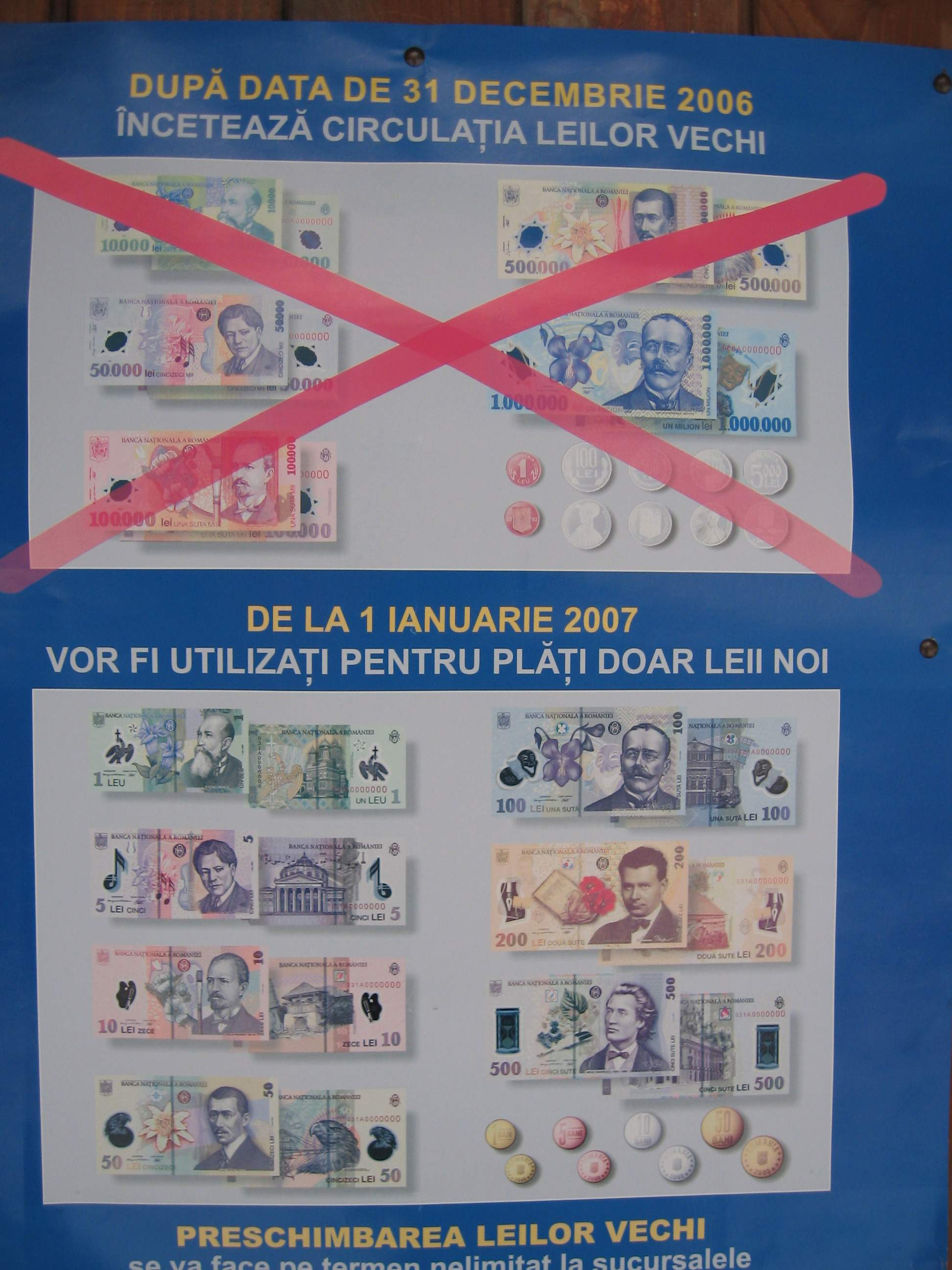 Ein Werbeplakat in Rumänien deutet auf die Währungsumstellung hin. Das Bild habe ich im Januar 2007 in Sinaia/Rumänien aufgenommen.